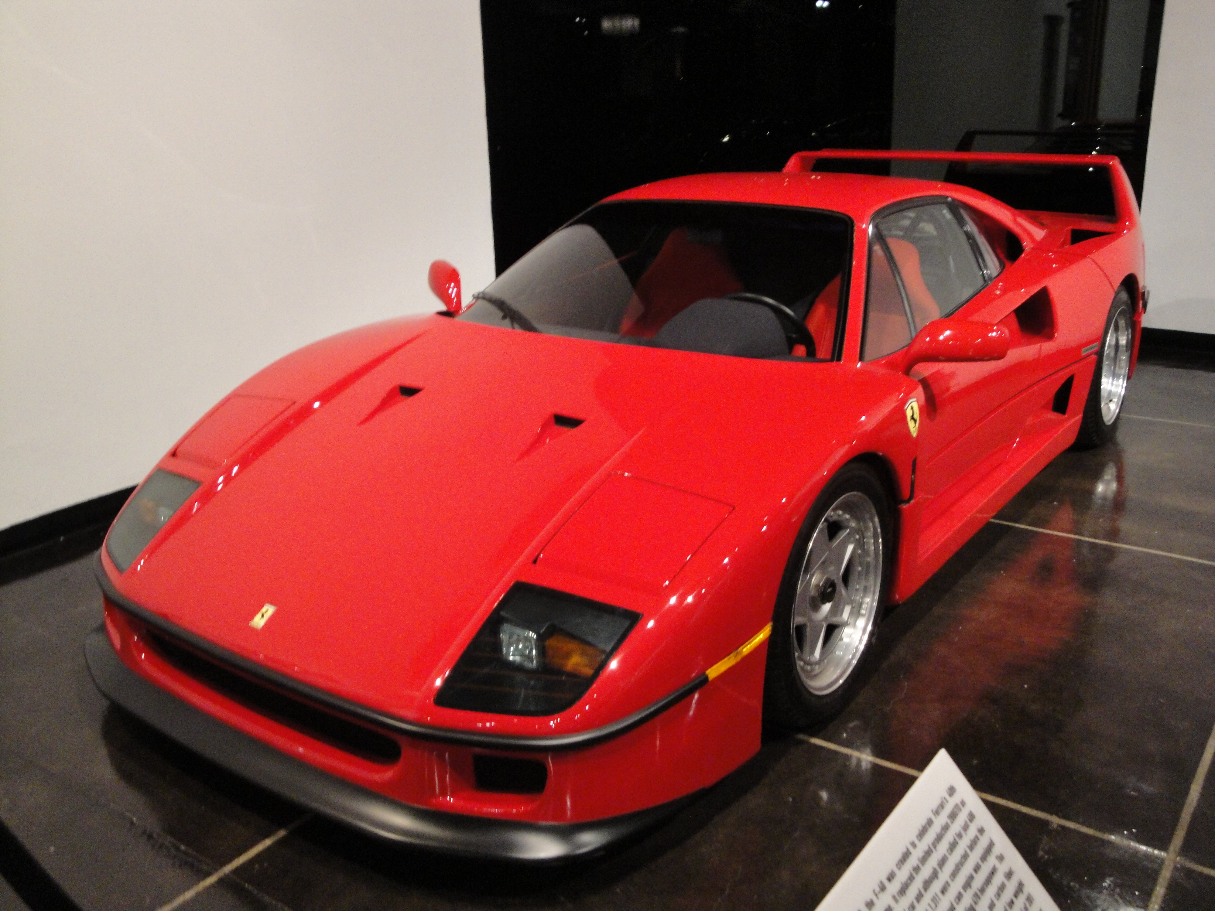 90 Ferrari F-40